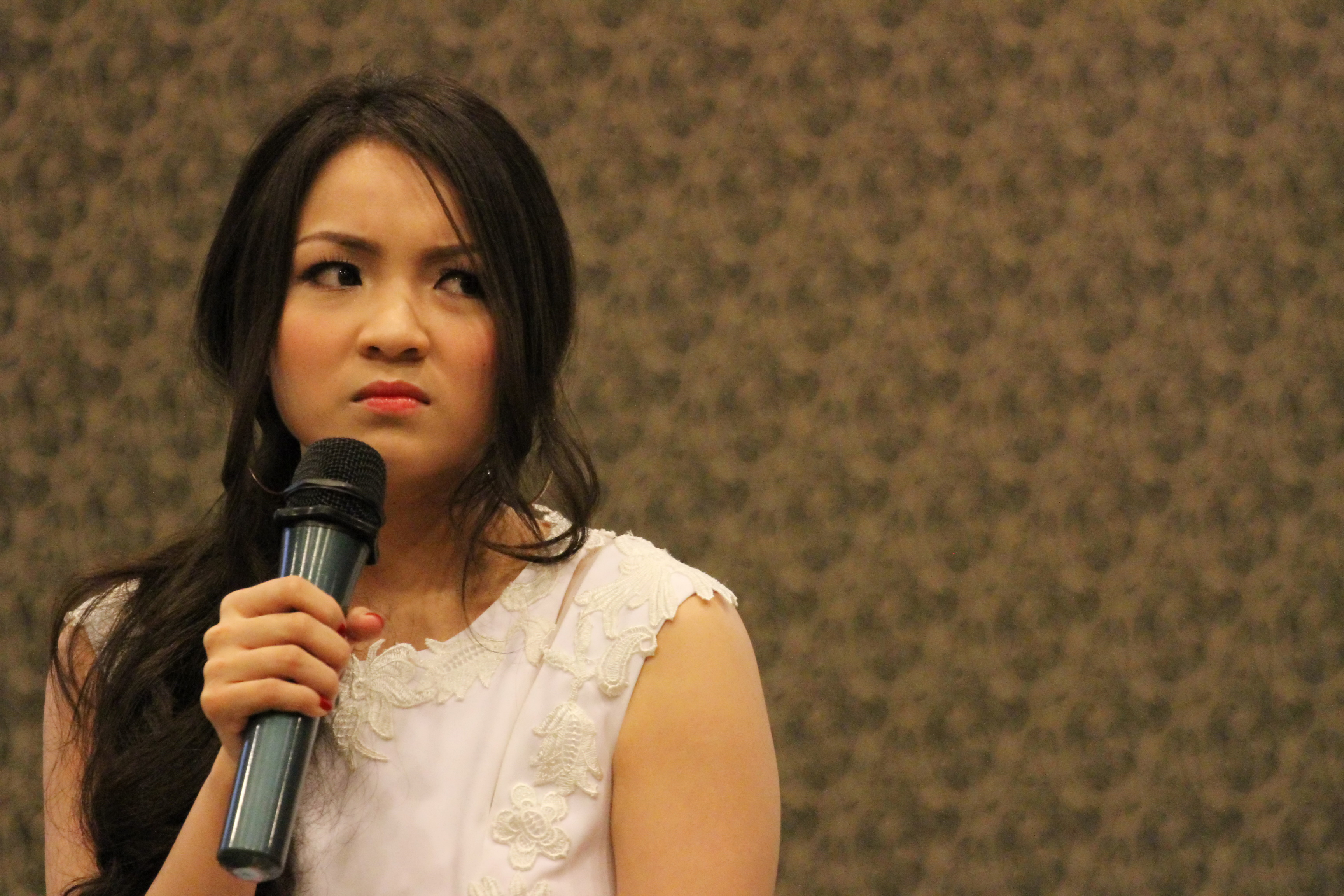 Huỳnh Minh Thủy.